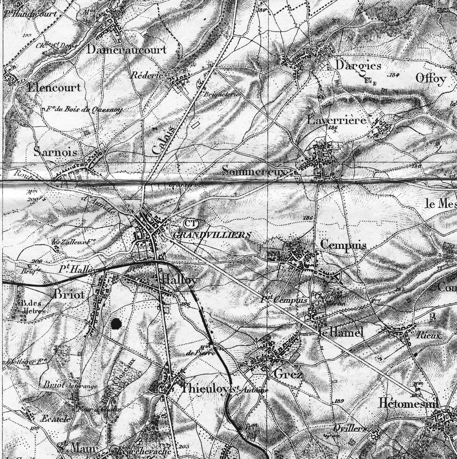 Carte d'état-Major, feuille de Montdidier (Oise), 1/80.000e, révision de 1885, numérisation à 300dpi